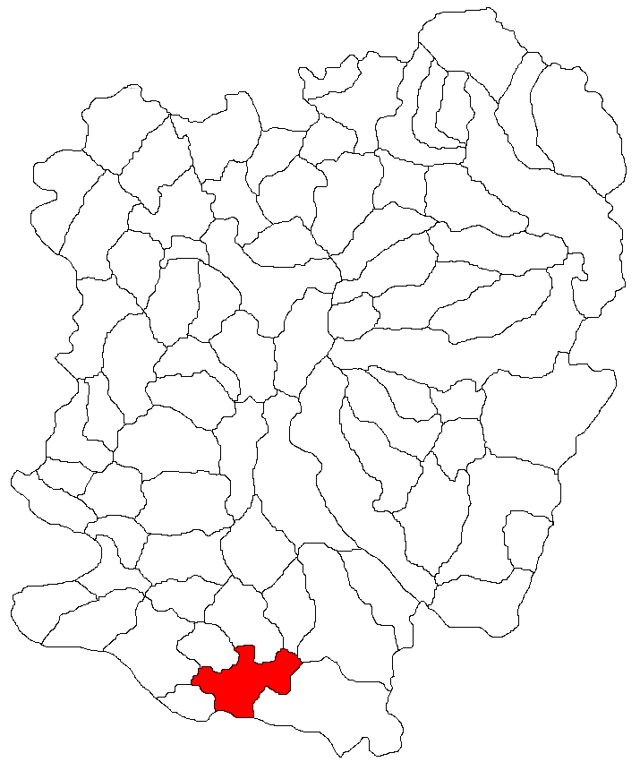 Categorie:Hărţi ale judeţului Caraş-Severin